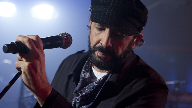 No te pierdas una presentacion exclusiva con Juan Luis Guerra en Acceso Total. Visita